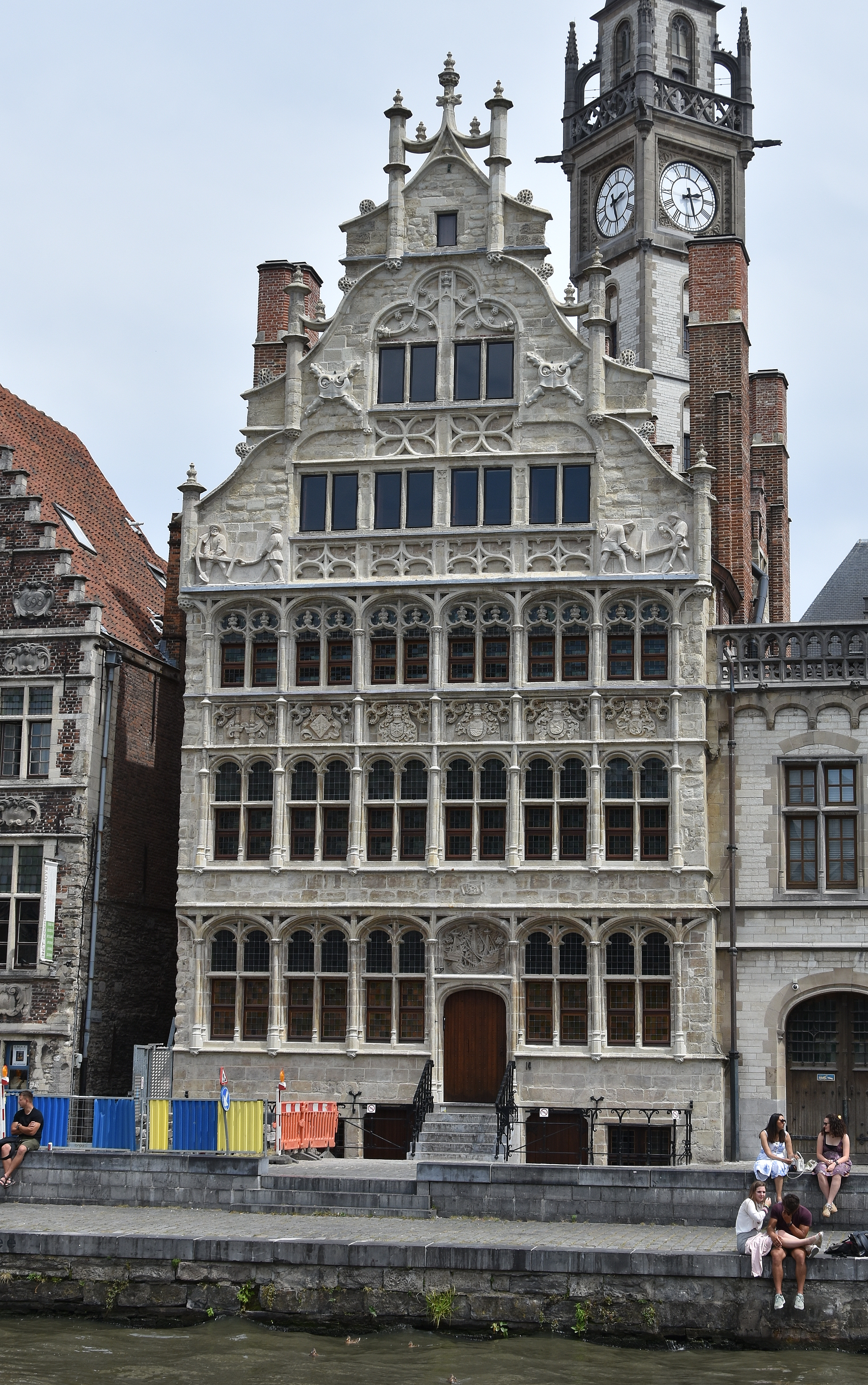 Huis van de Vrije Schippers Gent 30-06-2019 This photo of immovable heritage has been taken in the Flemish Region